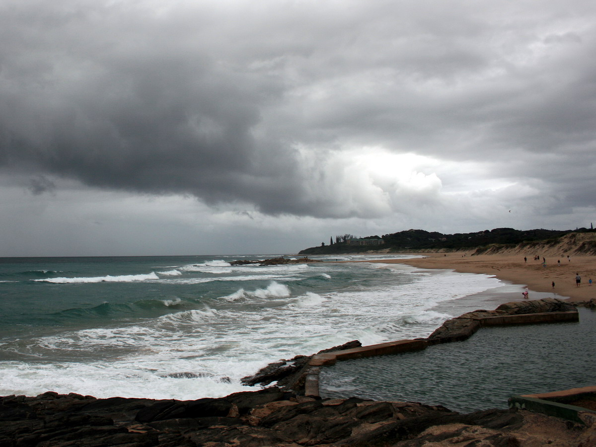 Marina Beach